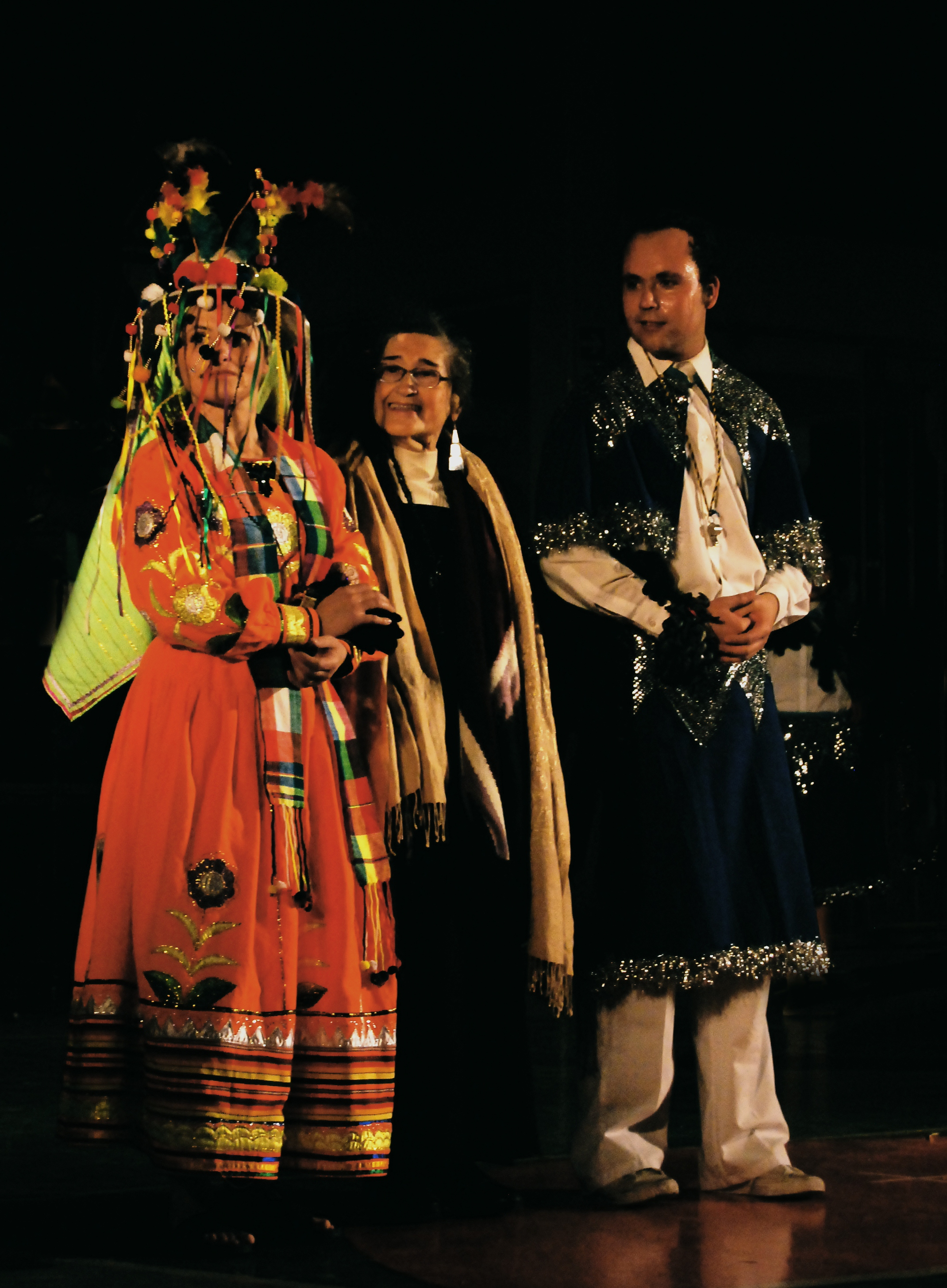 Grupo PALOMAR